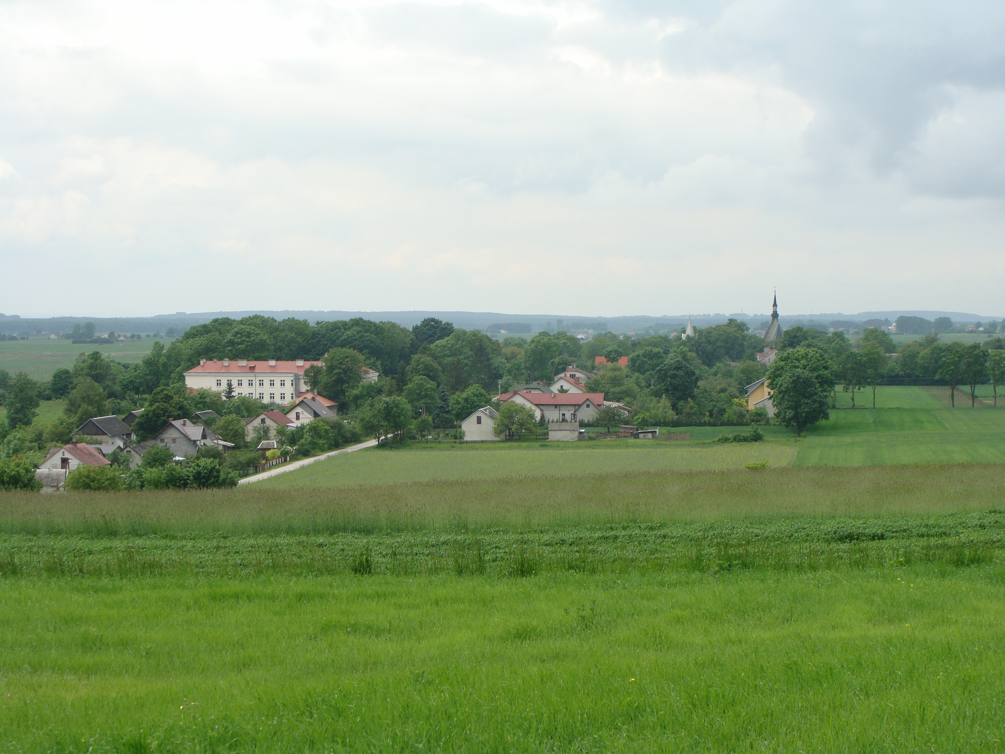 Szaniec